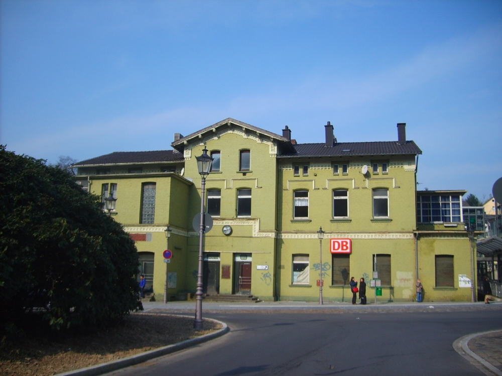 Bahnhof Langenberg in Velbert, Germany